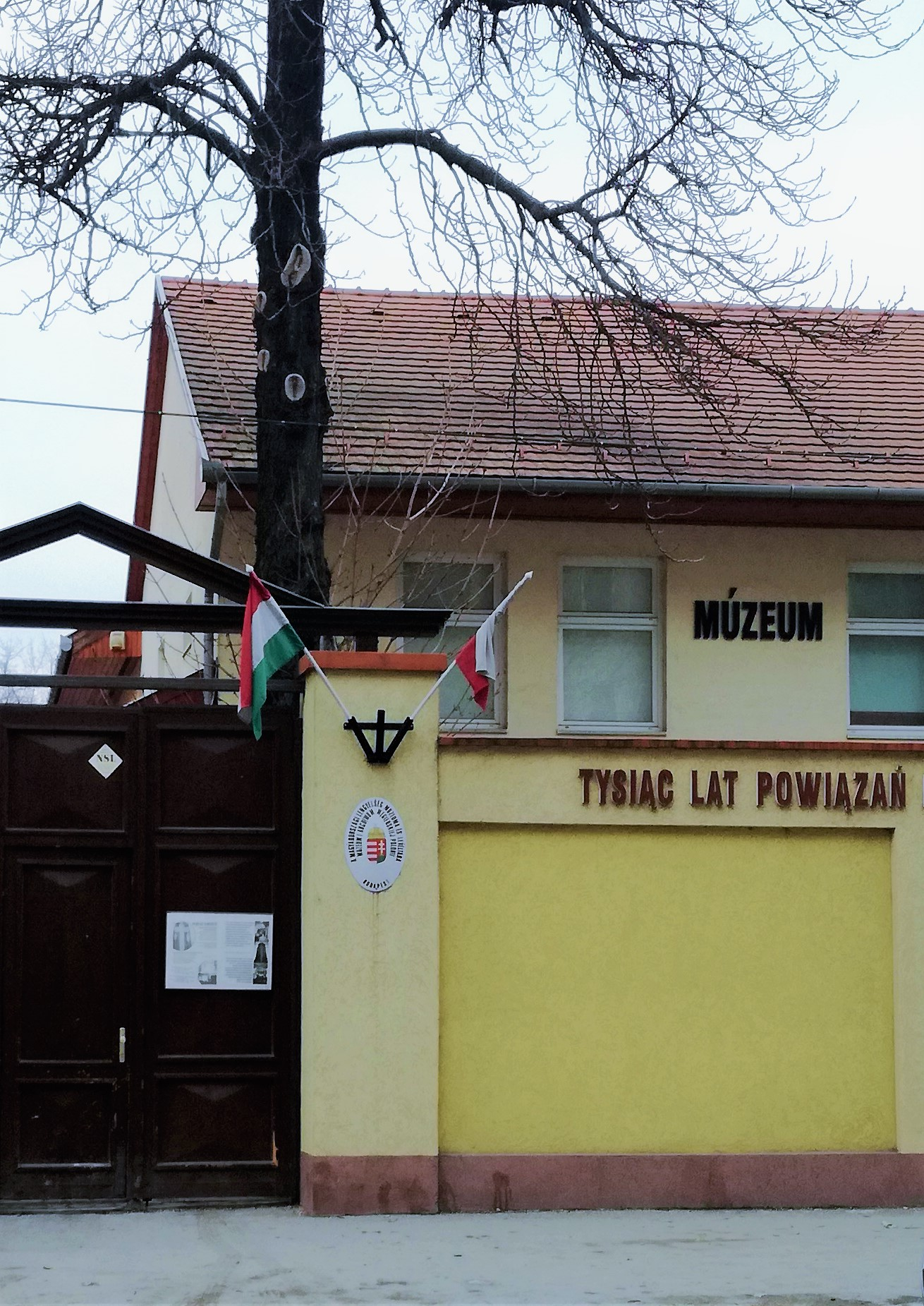 Polski Instytut Badawczy i Muzeum w Budapeszcie - budynek